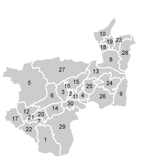 Lage der Gemeinde innerhalb des Bezirks Kufstein